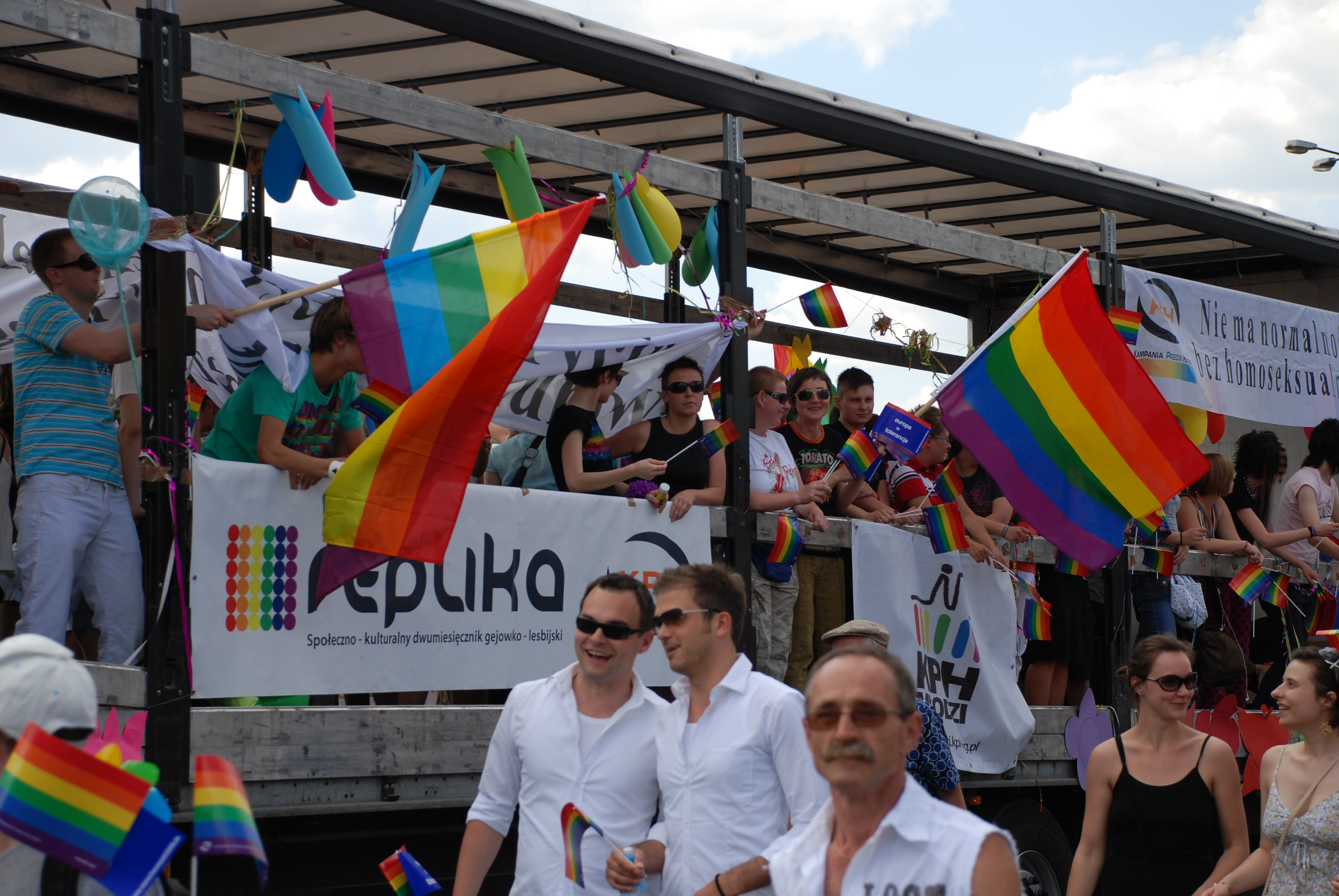 Parada Równości - Warszawa - 7 czerwca 2008